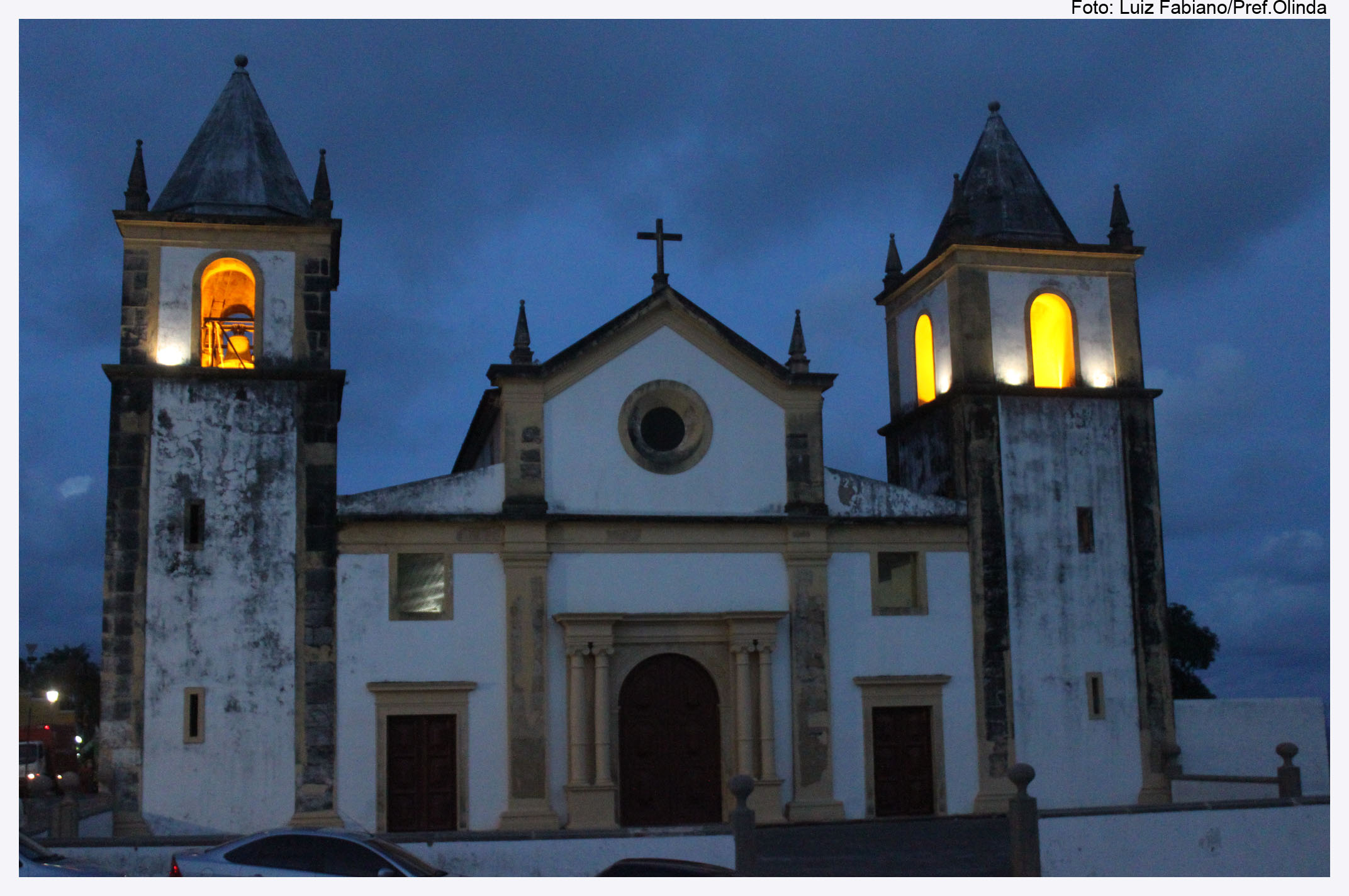 Também conhecida como igreja de São Salvador do Mundo, a igreja da Sé, localizada no Largo da Sé, foi fundada em 1540, sendo reconstruída e ampliada no final do século XVI. Converteu-se, a partir de 1676, em Catedral da Arquidiocese de Olinda e Recife. Foto: Luiz Fabiano/ Pref.Olinda